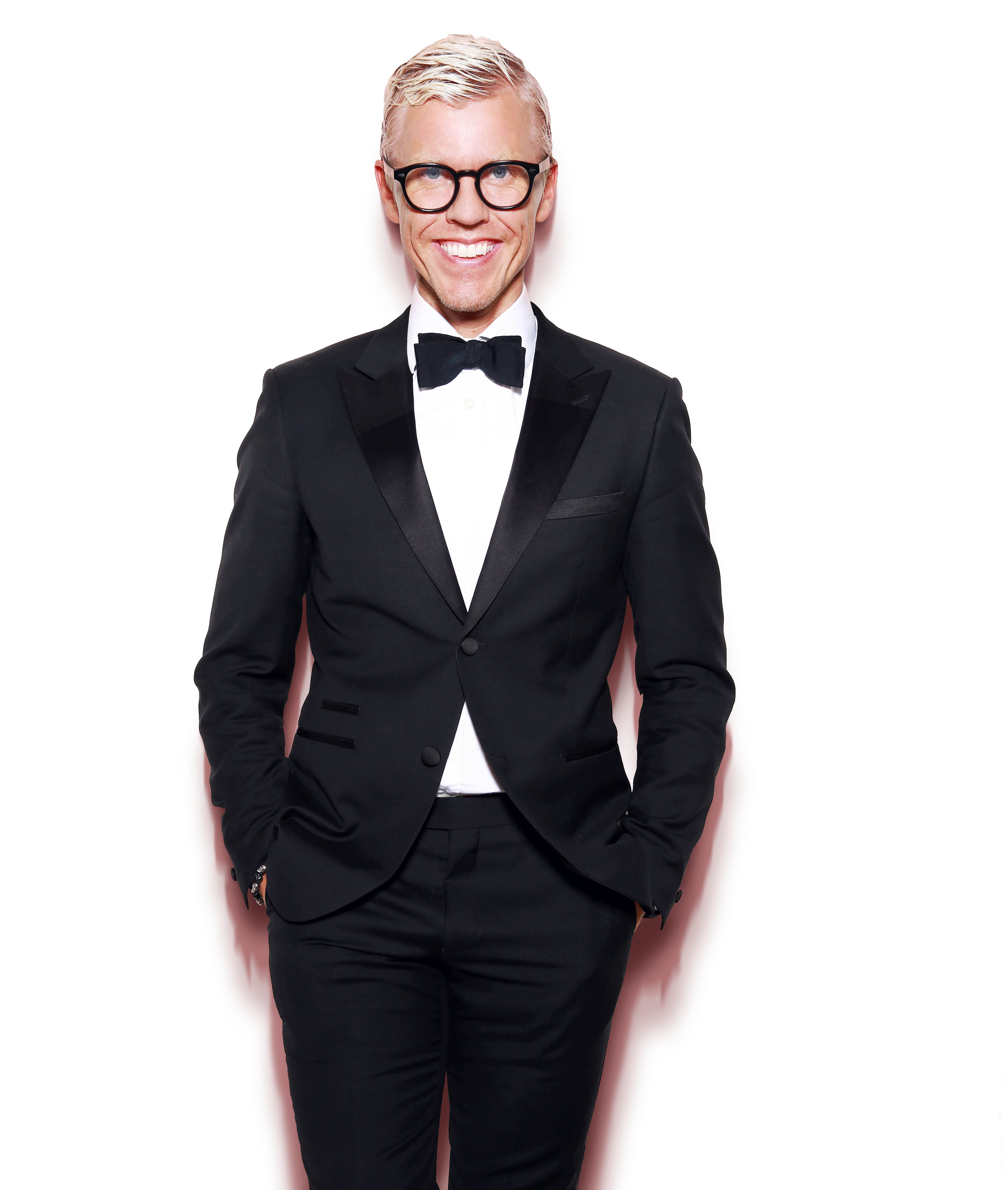 Bingo Rimér